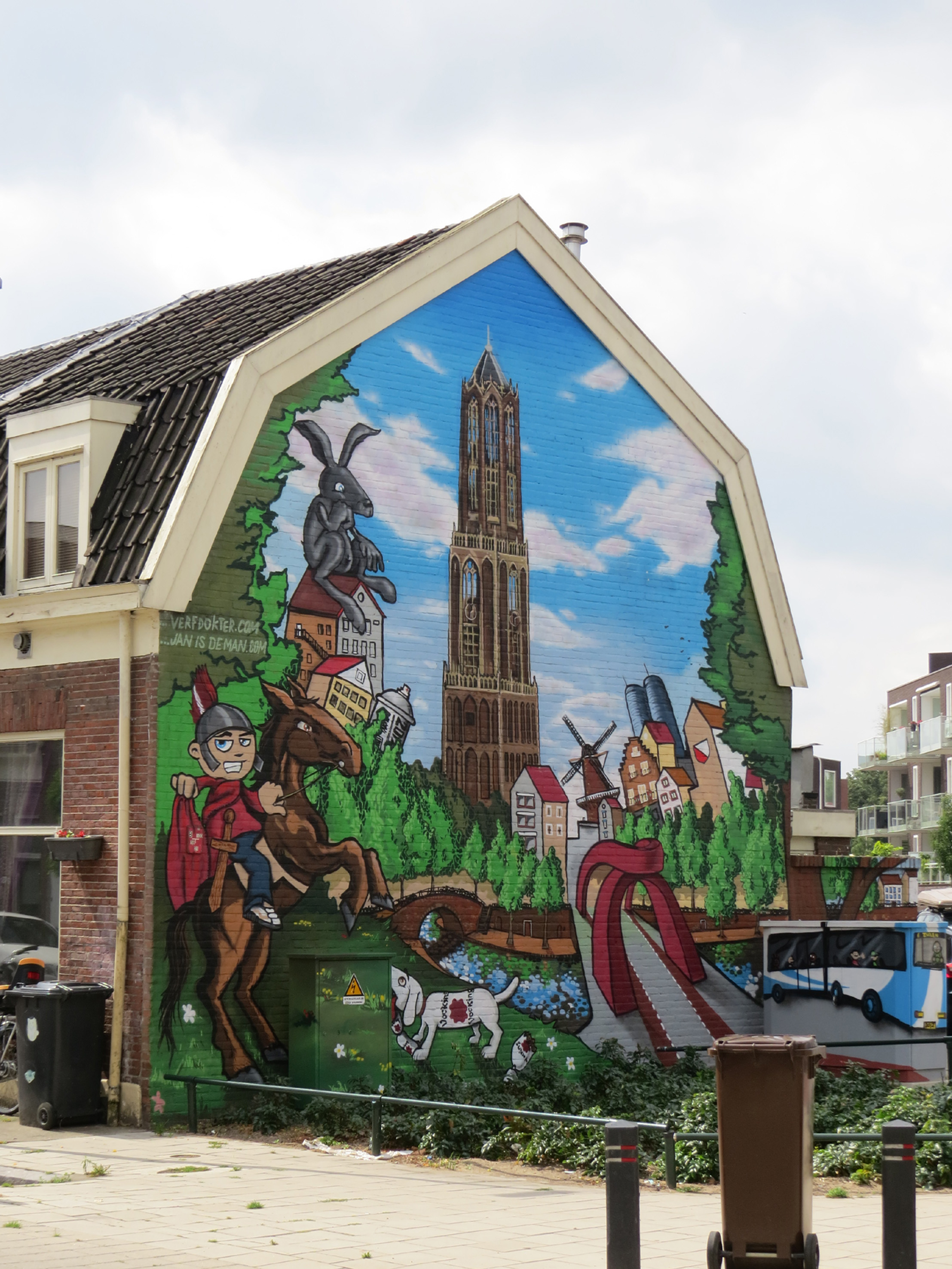 Muurschildering waarop diverse Utrechtse zaken worden afgebeeld: Domtoren, Sint Maarten te paard, Vockingworst, prostitutieboten op de Vecht, Rode Brug, windmolen Rijn en Zon